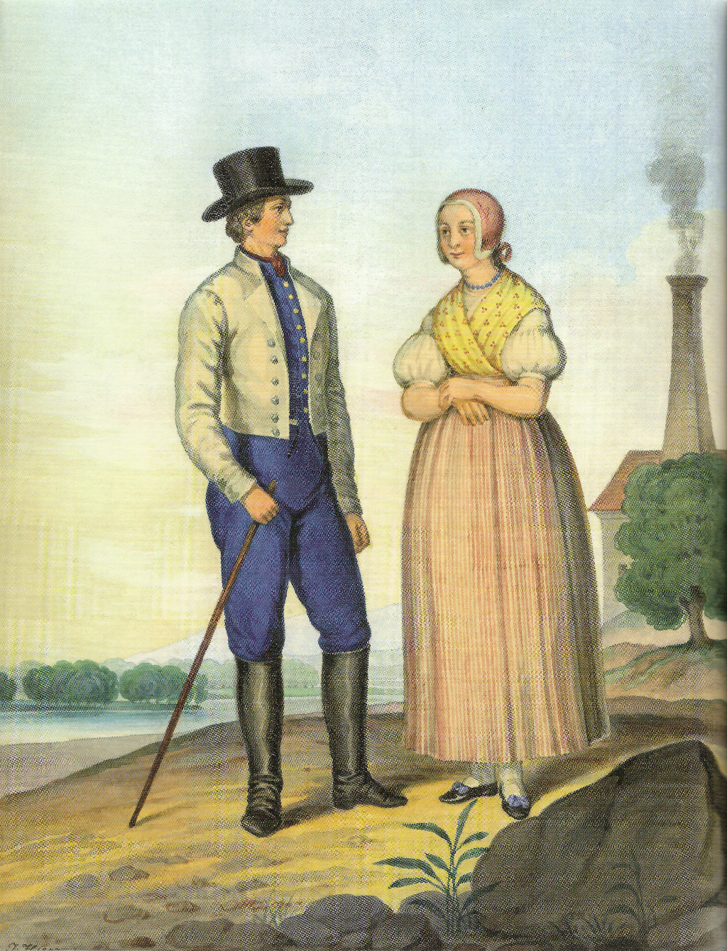 Akwarela Henryka Jastrzembskiego przedstawiająca Włościan z okolic Frysztatu (Karwiny) z 1847 roku.